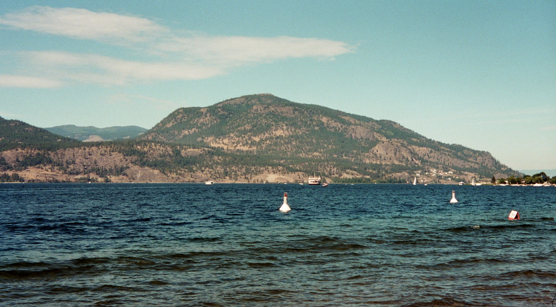 Blick über den Okanagan Lake von Kelowna